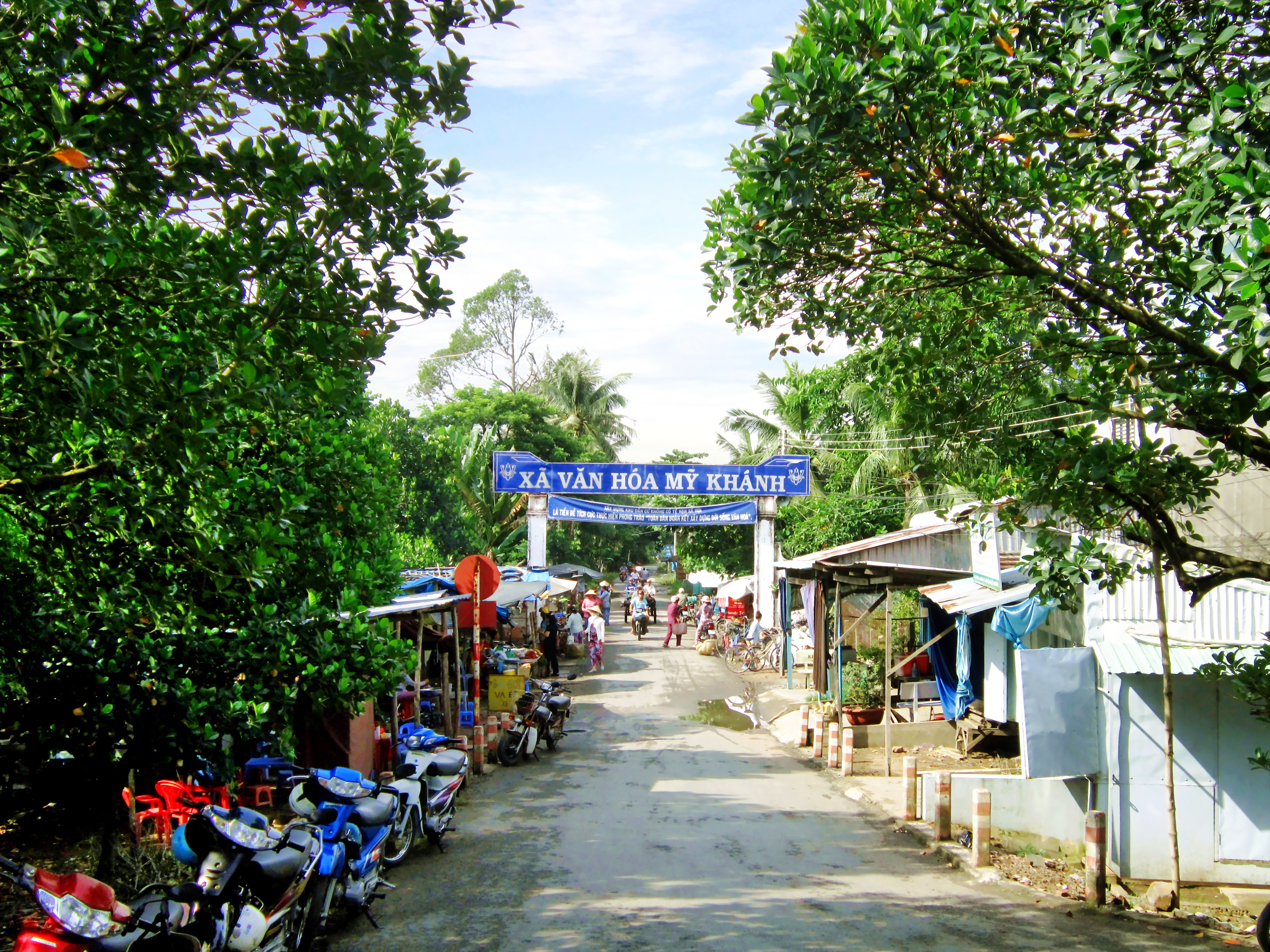 Cổng chào xã Mỹ Khánh, thuộc thành phố Long Xuyên, tỉnh An Giang, Việt Nam.